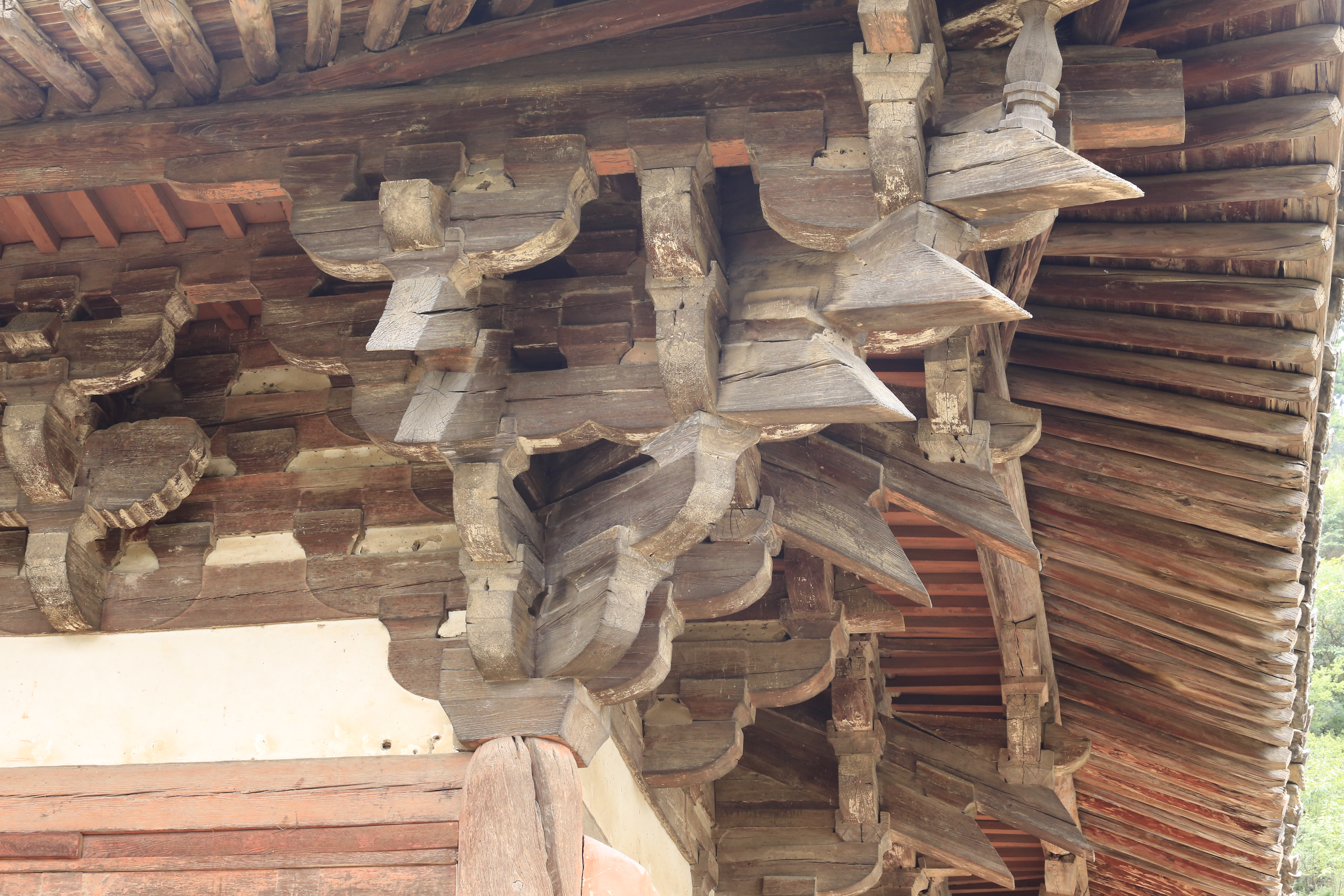 五台佛光寺—— 大殿西南角斗栱